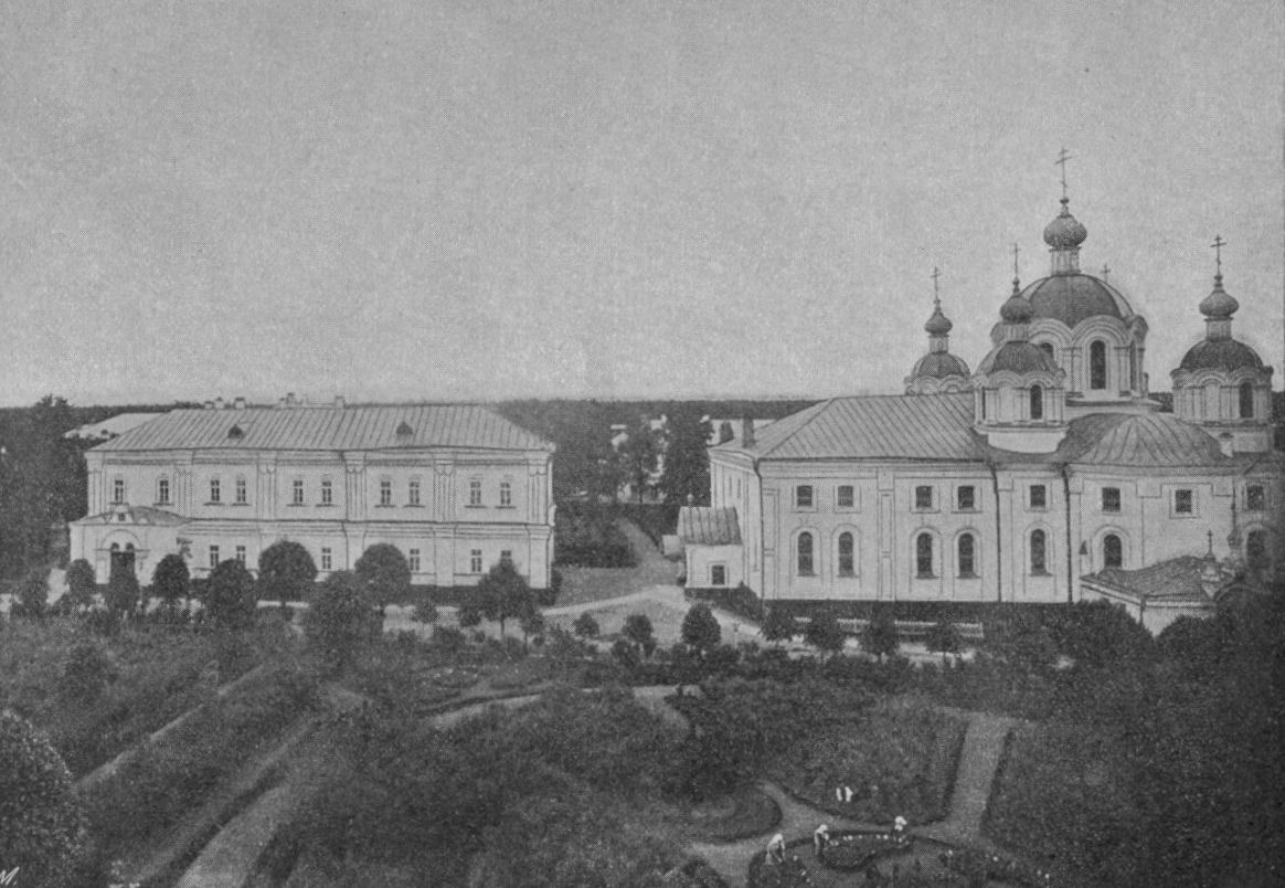 Иверский храм (Выкса)